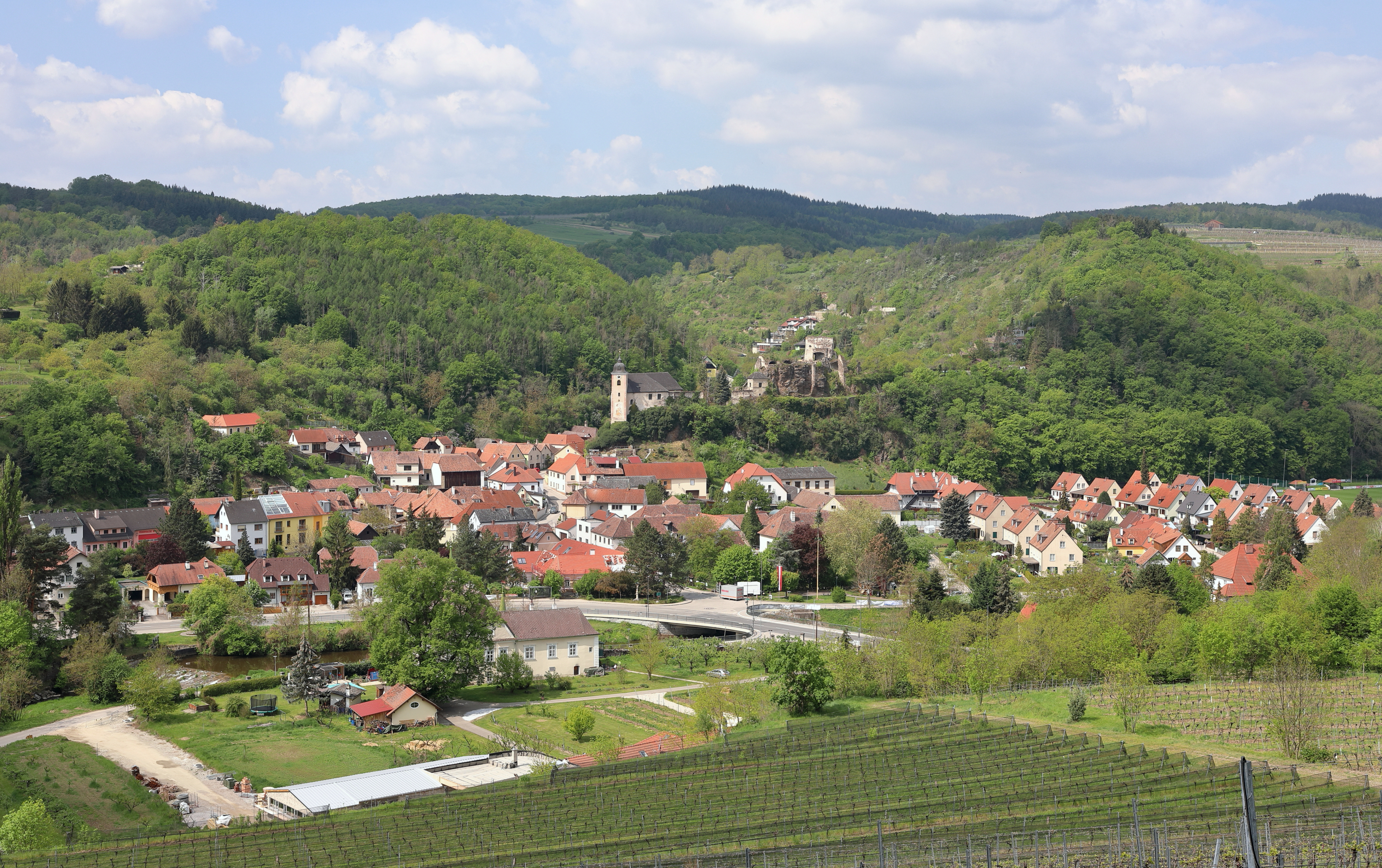 Ostansicht von Rehberg im Kremstal, eine ehemalige Gemeinde (bis 1938) und jetzt ein Ortsteil der niederösterreichischen Stadtgemeinde Krems an der Donau. Im Bildzentrum die Burgruine Rehberg mit der Burg- bzw. Filialkirche hl. Johannes der Täufer.